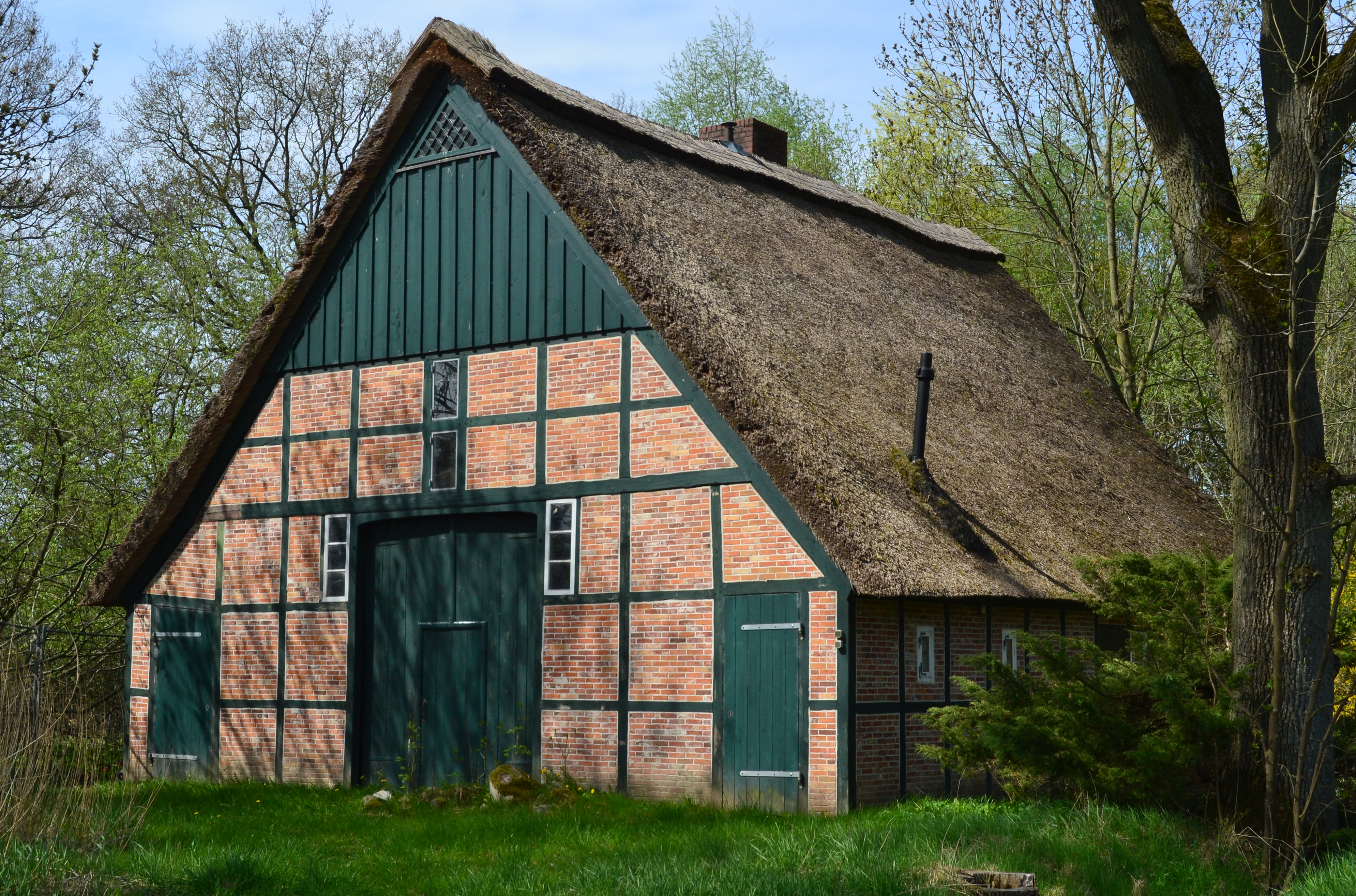 Die Fachwerkkate in Hemdingen (Kulturdenkmal)